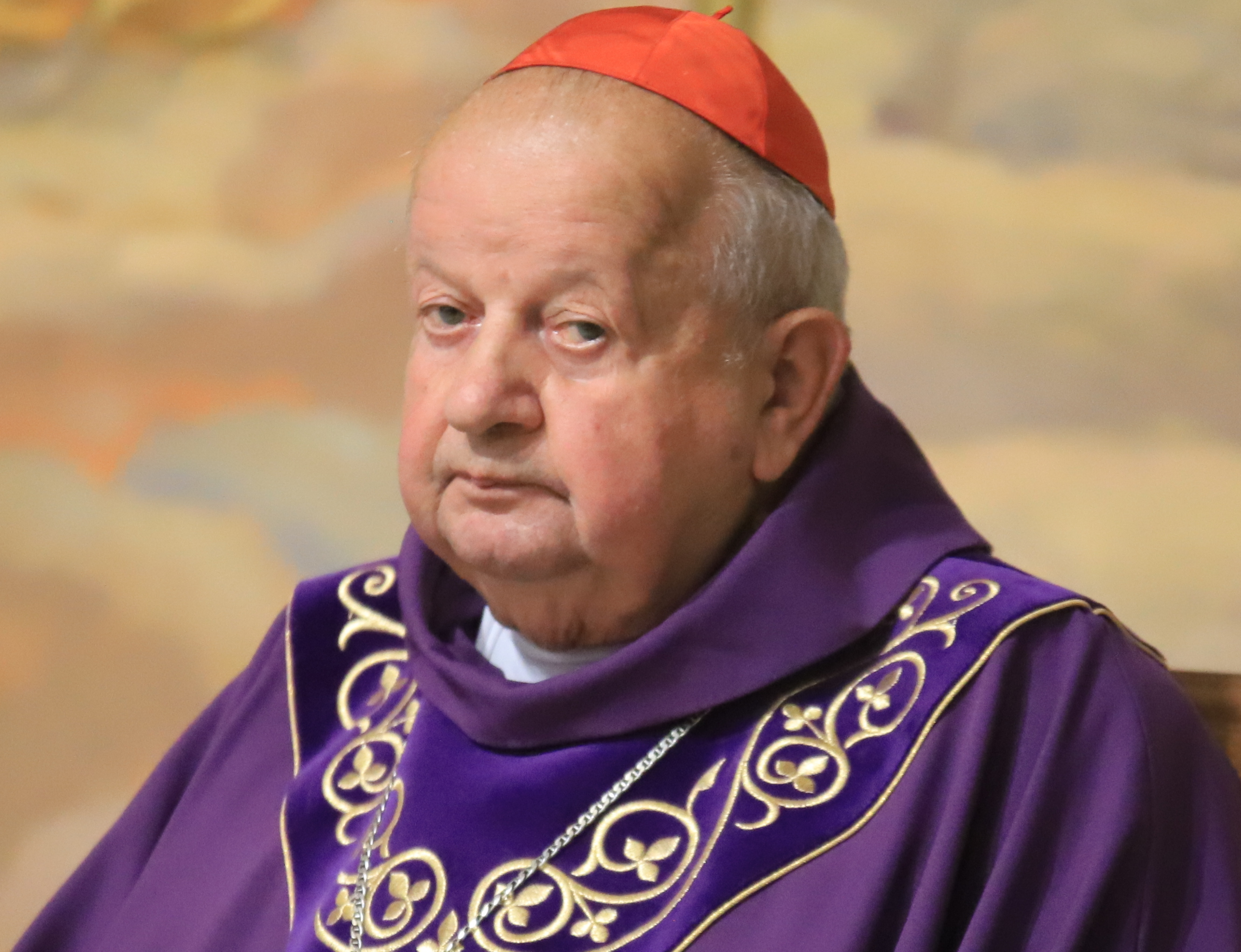 Dzień Zaduszny w Sanktuarium Jana Pawła II w Krakowie